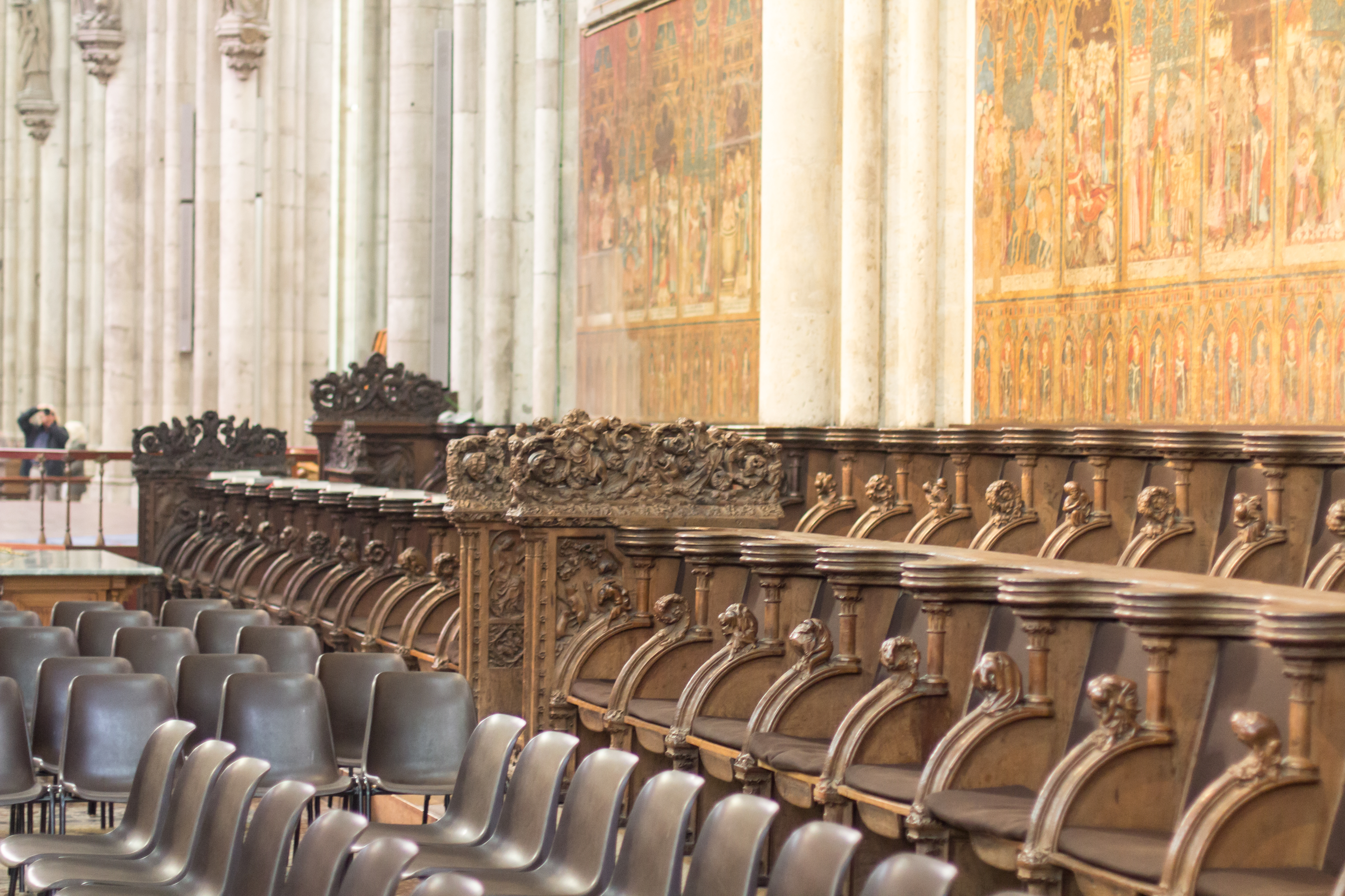 Teile des Chorgestühls des Kölner Domes. Nördliche Sitzreihe von Osten. Sichtbar Wange NC (Innenseite/Osten), vorne Reihe NII Sitze 13-6 (v.l.n.r)